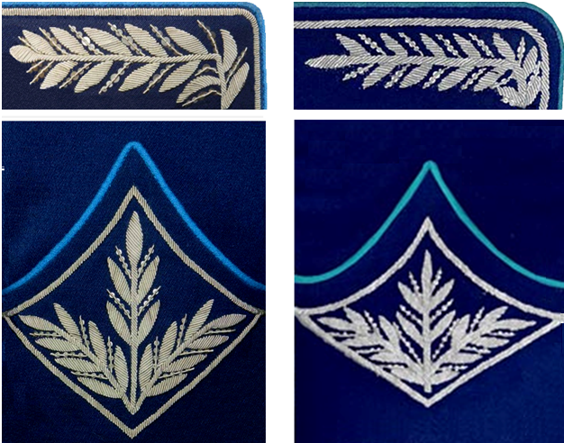 шитье комиссаров